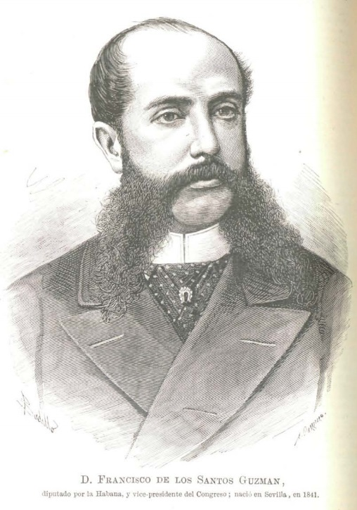 Francisco de los Santos Guzmán, diputado a Cortes por Cuba.